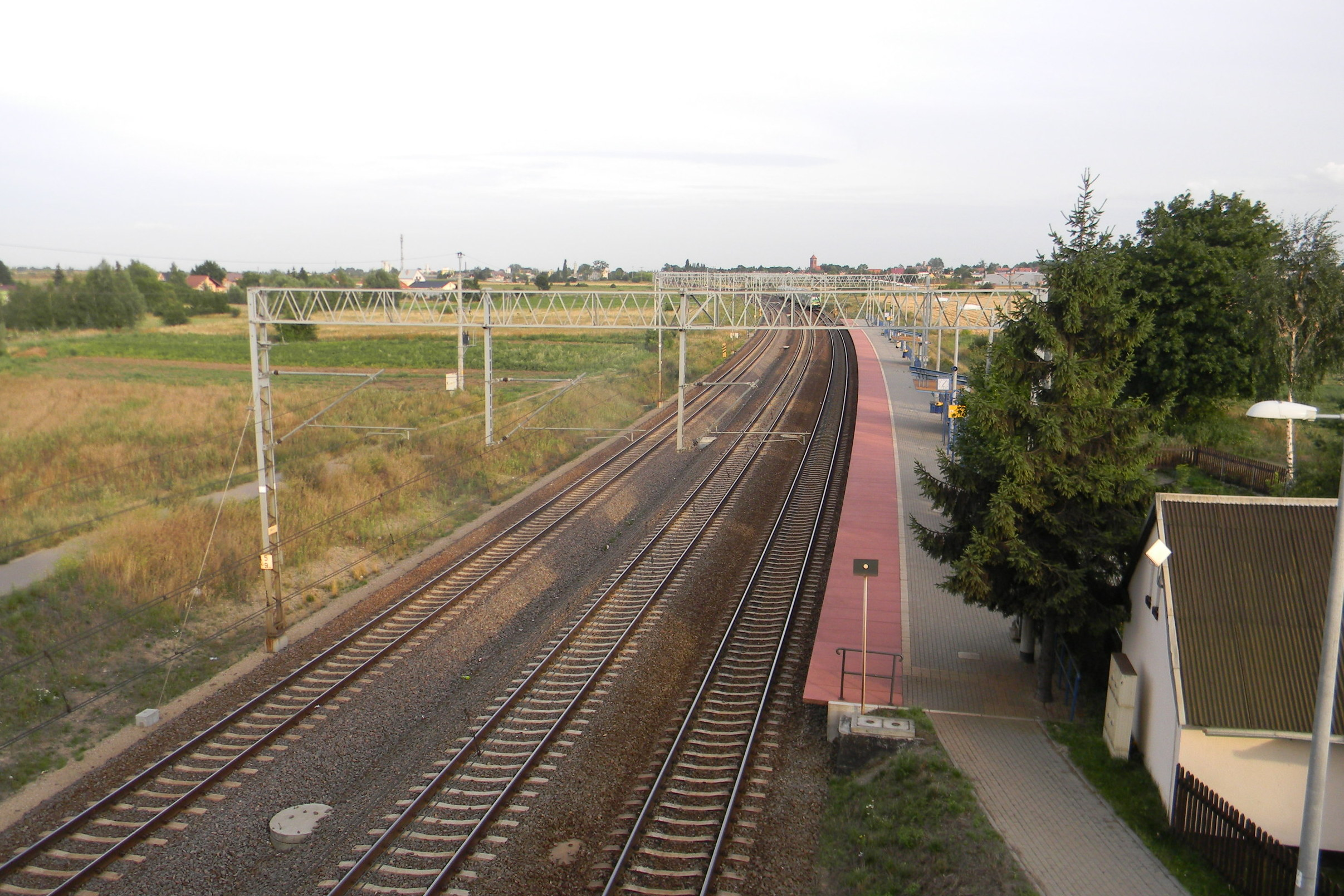 peron w Skowarczu